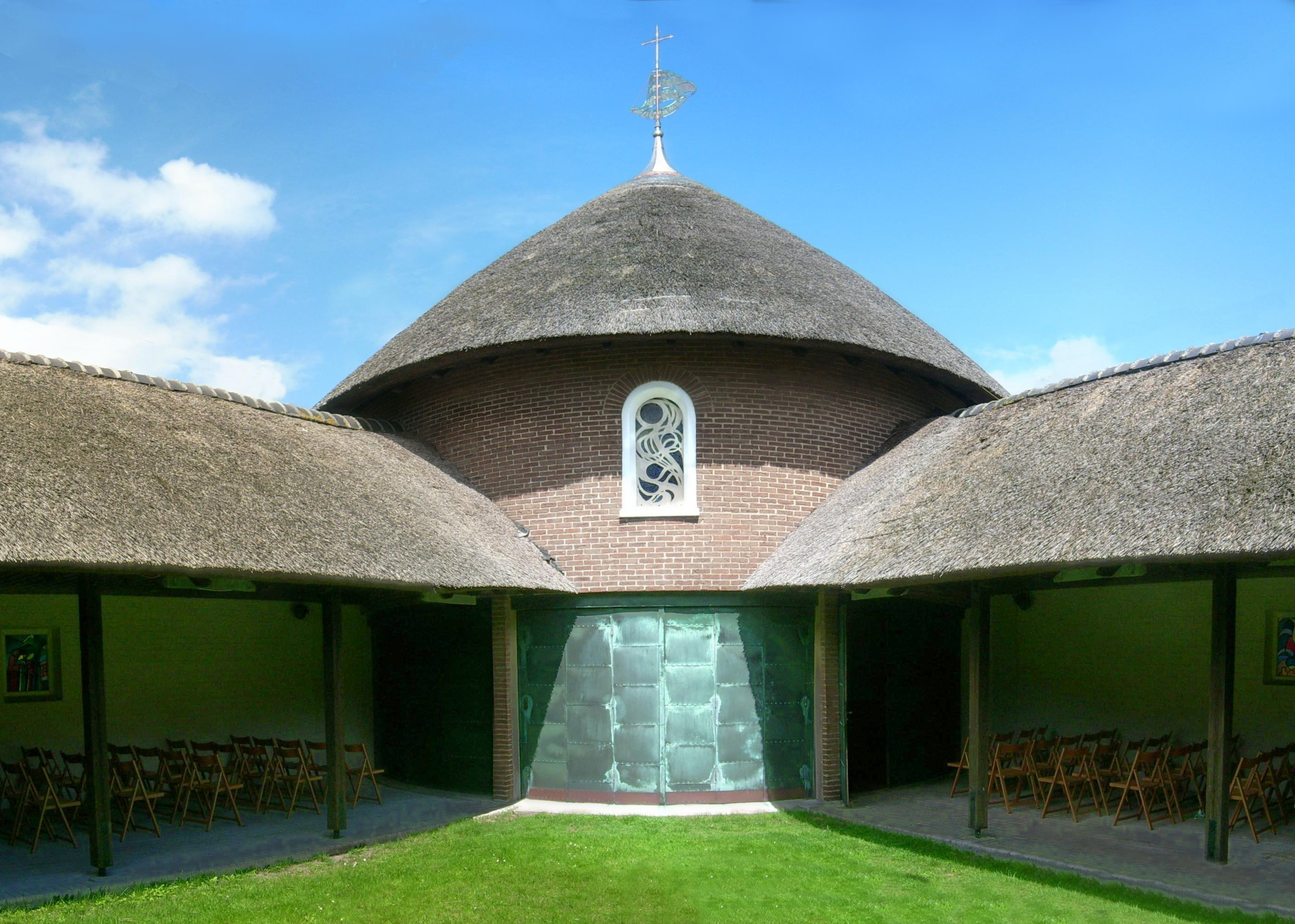 Neue katholische Kirche St. Nikolaus auf Baltrum (mit Reet gedeckt)